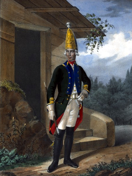 Гренадерский Унтер-офицер Пермского Мушкетерского полка. 1797-1801.